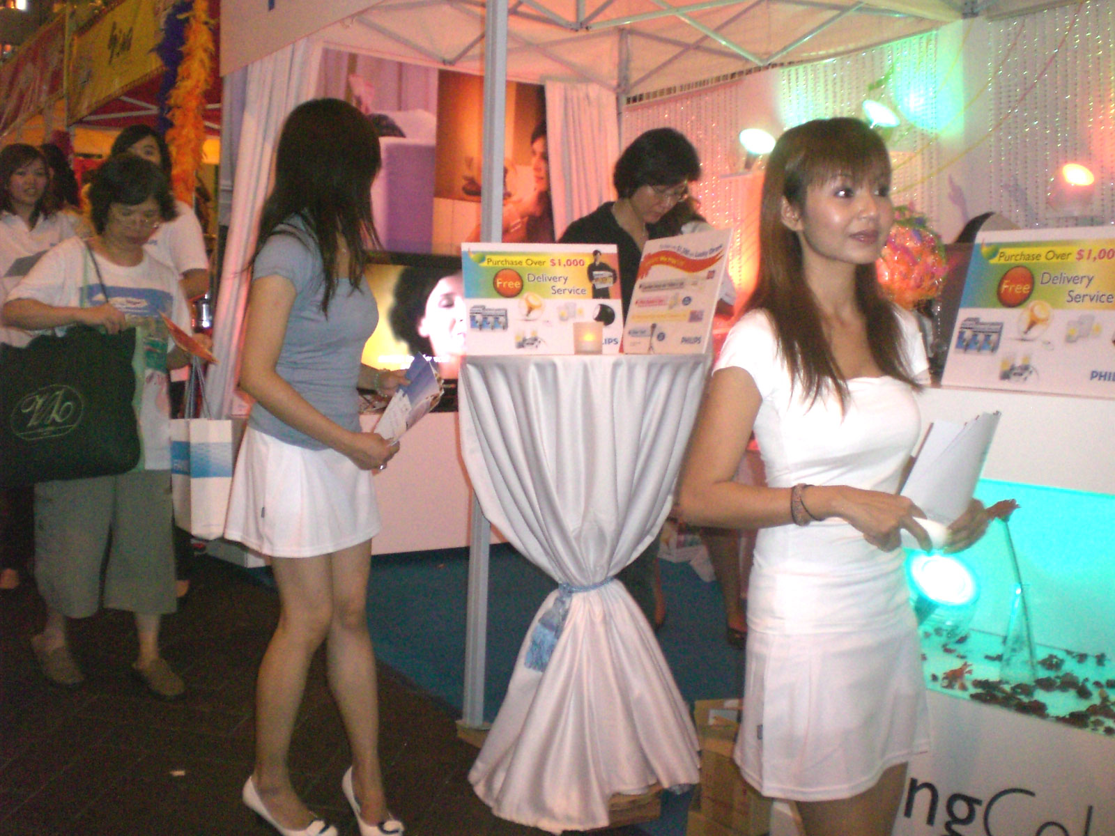 中環zh:蘭桂坊嘉年華